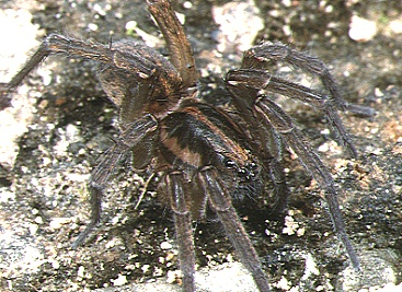 female Trochosa aquatica from Okinawa.